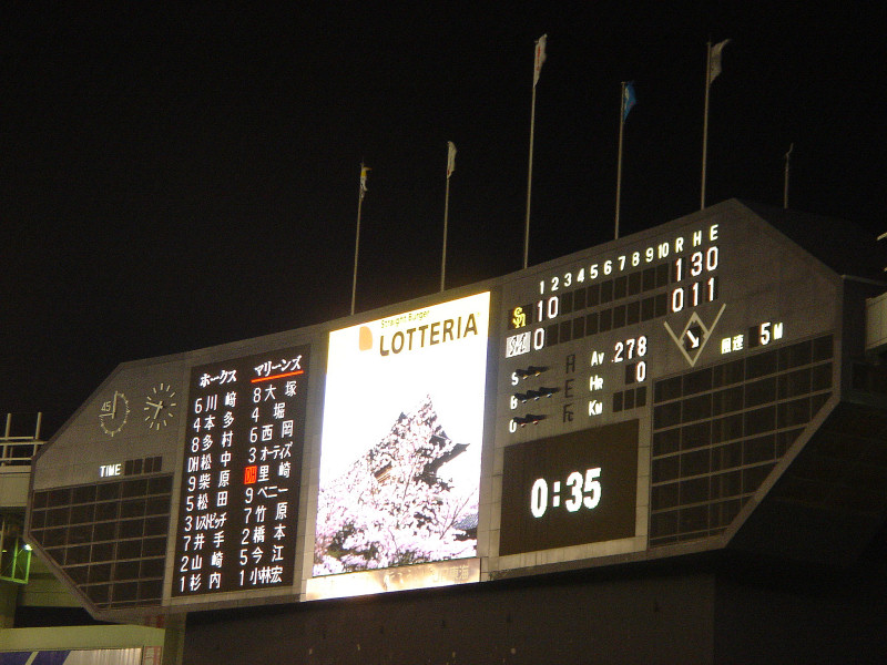 Description 千葉マリンスタジアムマリンビジョン(更新後) Date08/4/4 (千葉ロッテマリーンズ対福岡ソフトバンクホークス戦中に撮影)Source投稿者自身による撮影AuthorYamato-iPermission (Reusing this file) PD-self 2008年6月21日 (土) 21:16 . . Yamato-i . . 800×600 (152 キロバイト) 千葉マリンスタジアムマリンビジョン(更新後)